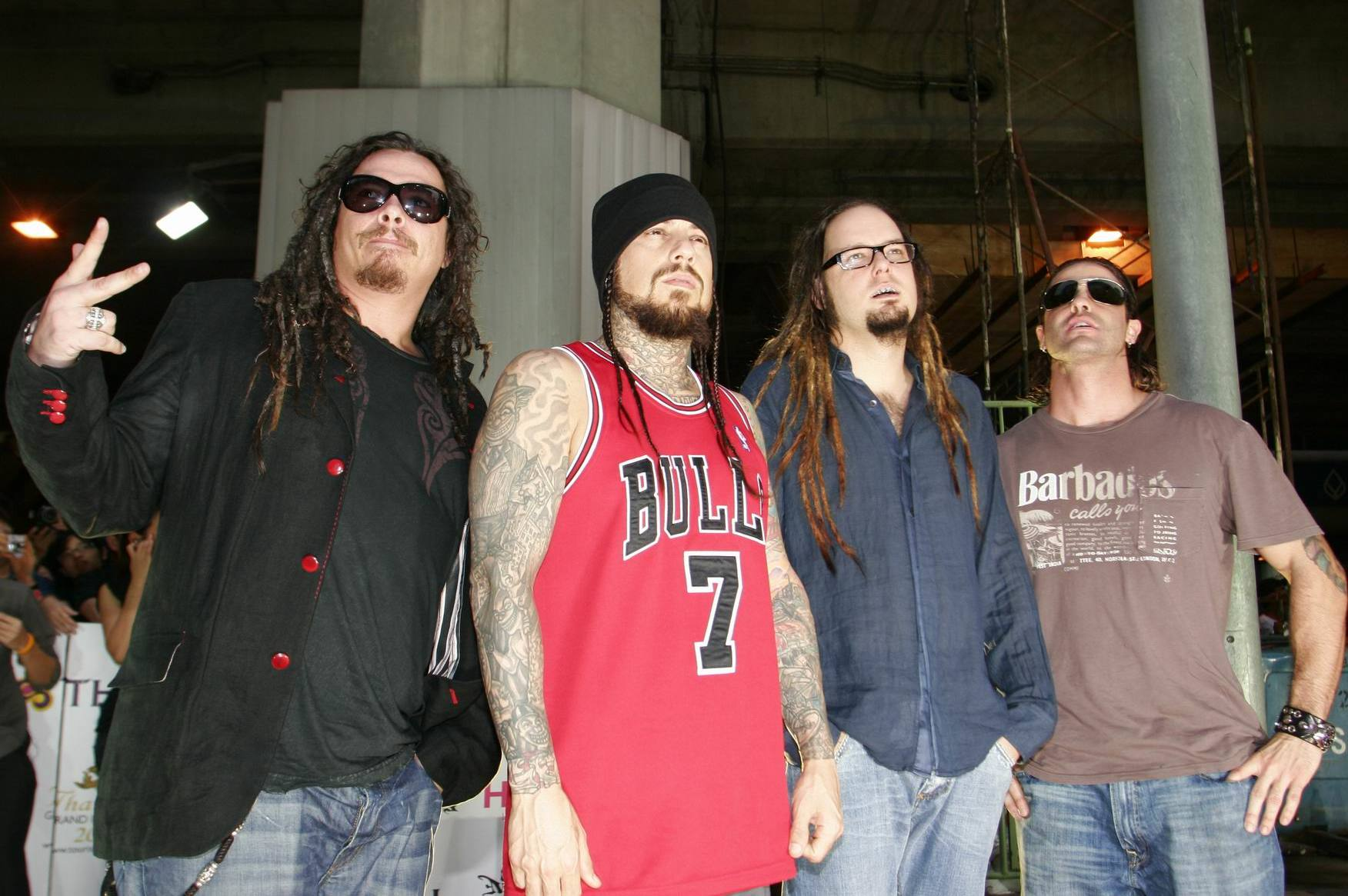 Korn at MTV Asia Awards 2006,Bangkok, Thailand